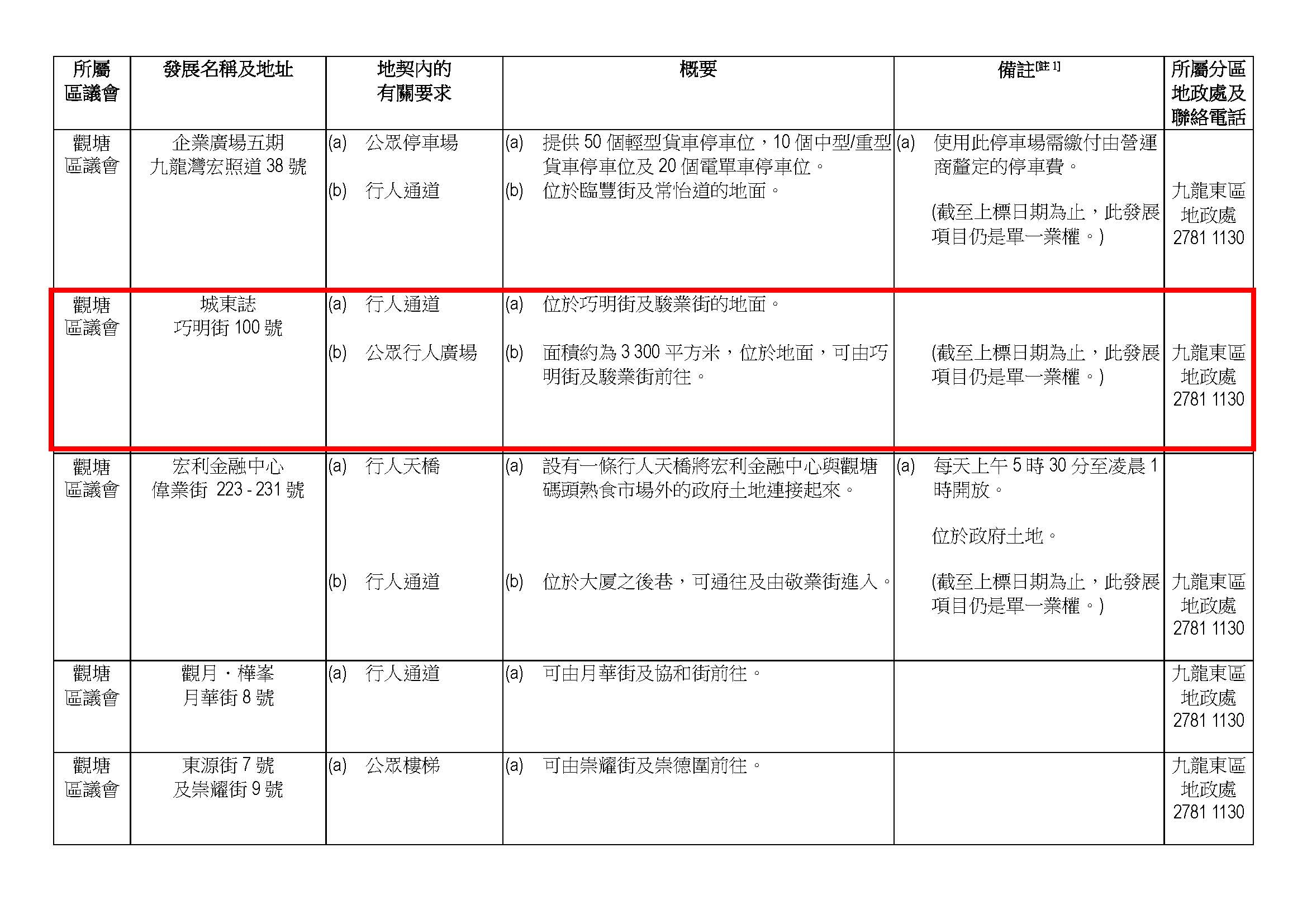 一九八零年或以後落成而須根據地契要求向公眾提供設施及／或休憩空間的私人發展項目(截至 2018 年 12月為止)